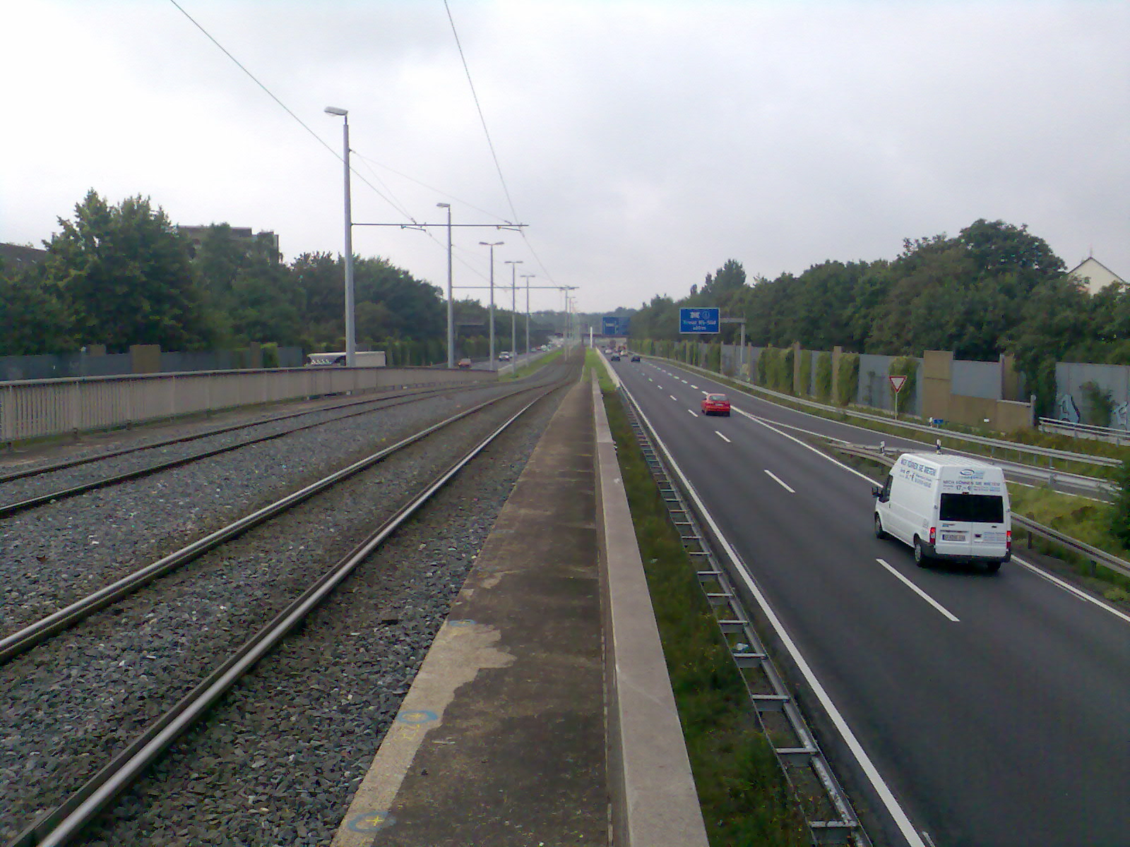 Blick von der Haltstelle "Sachsendamm" in Braunschweig auf die BAB 395 in Richtung Autobahnkreuz Braunschweig-Süd.